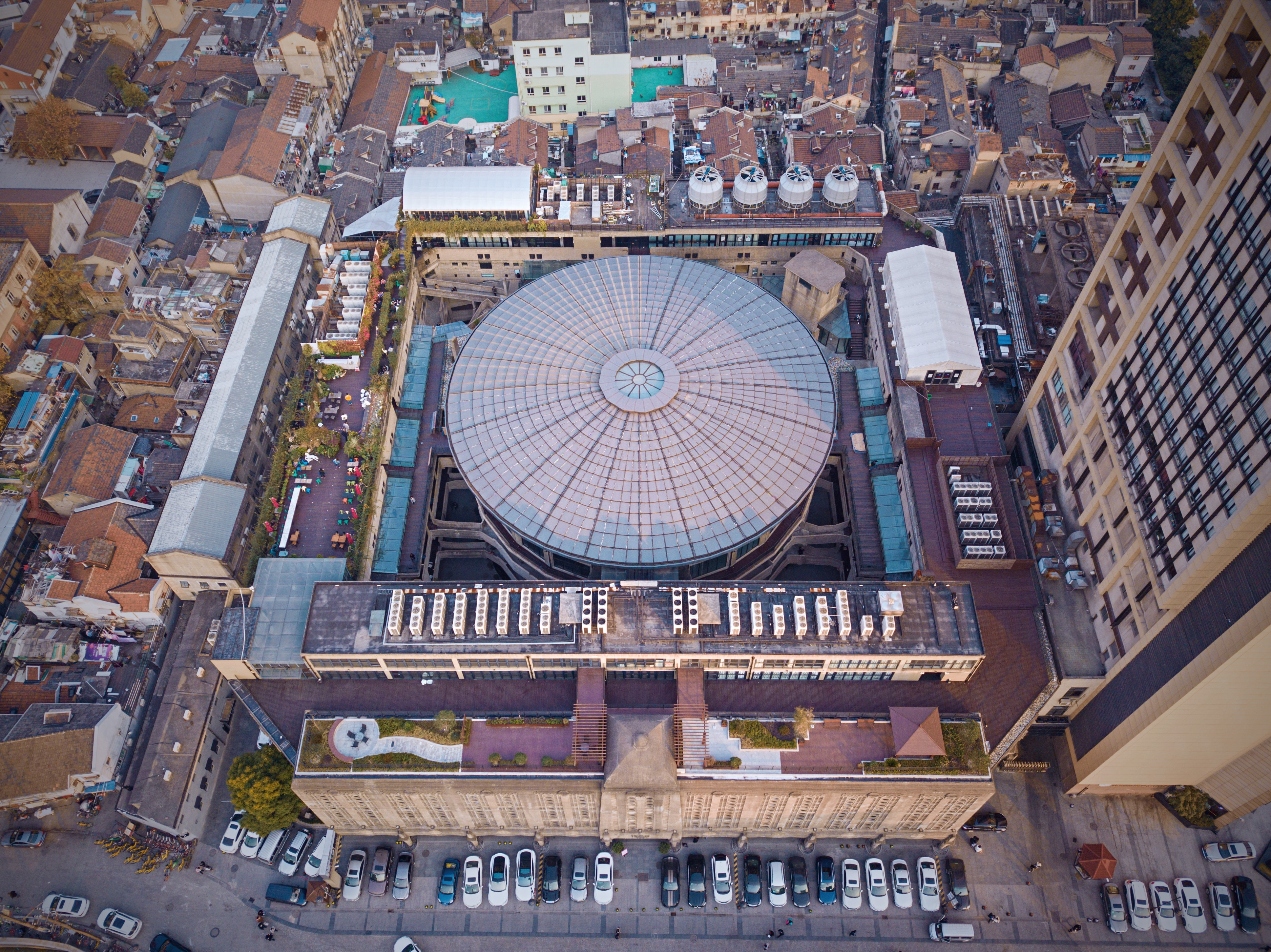 中文（中国大陆）: 上海公共租界工部局宰牲场，始建于1933年